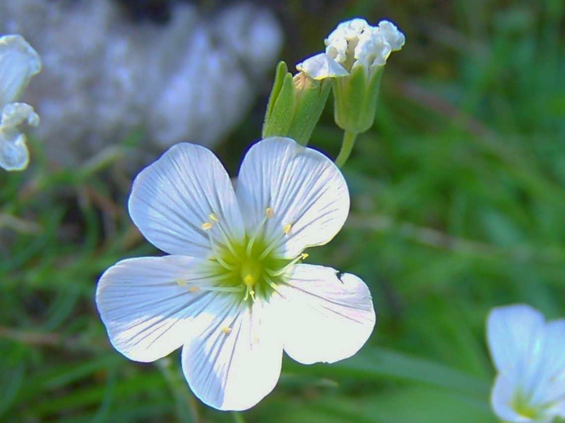 Gypsophila repens (pl. Łyszczec rozesłany), habitat: Tatra Mountains, Kalatówki